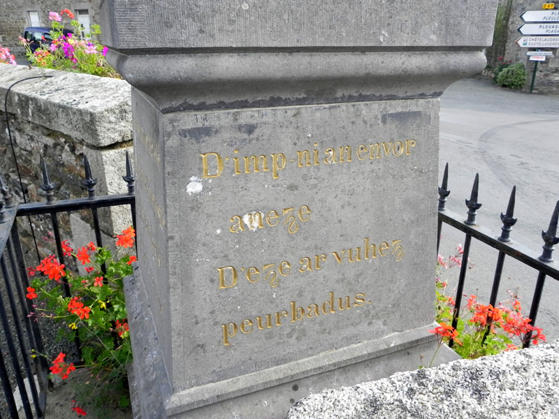 Dedi e brezhoneg